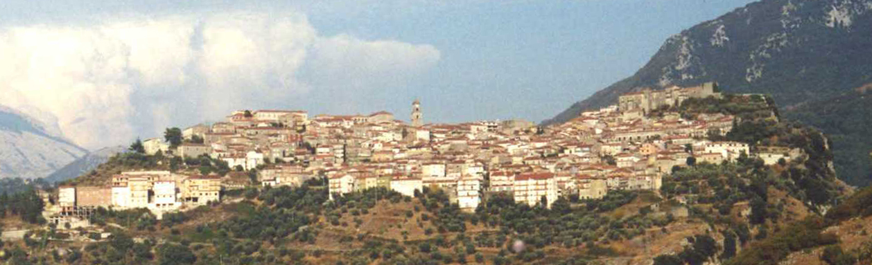 Panorama di Laurino fotografato da ovest